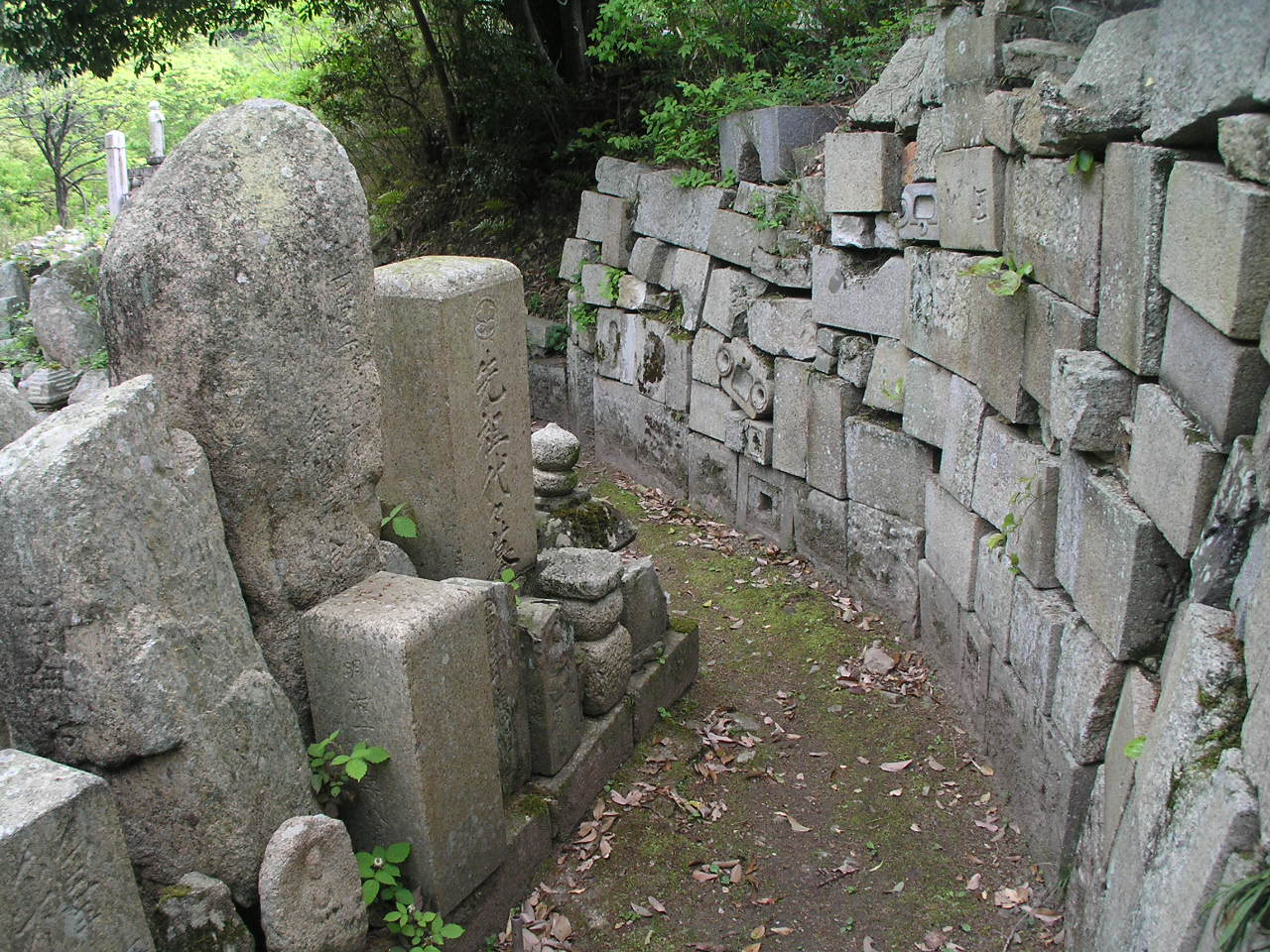 伊屋ヶ谷沿いの無縁仏